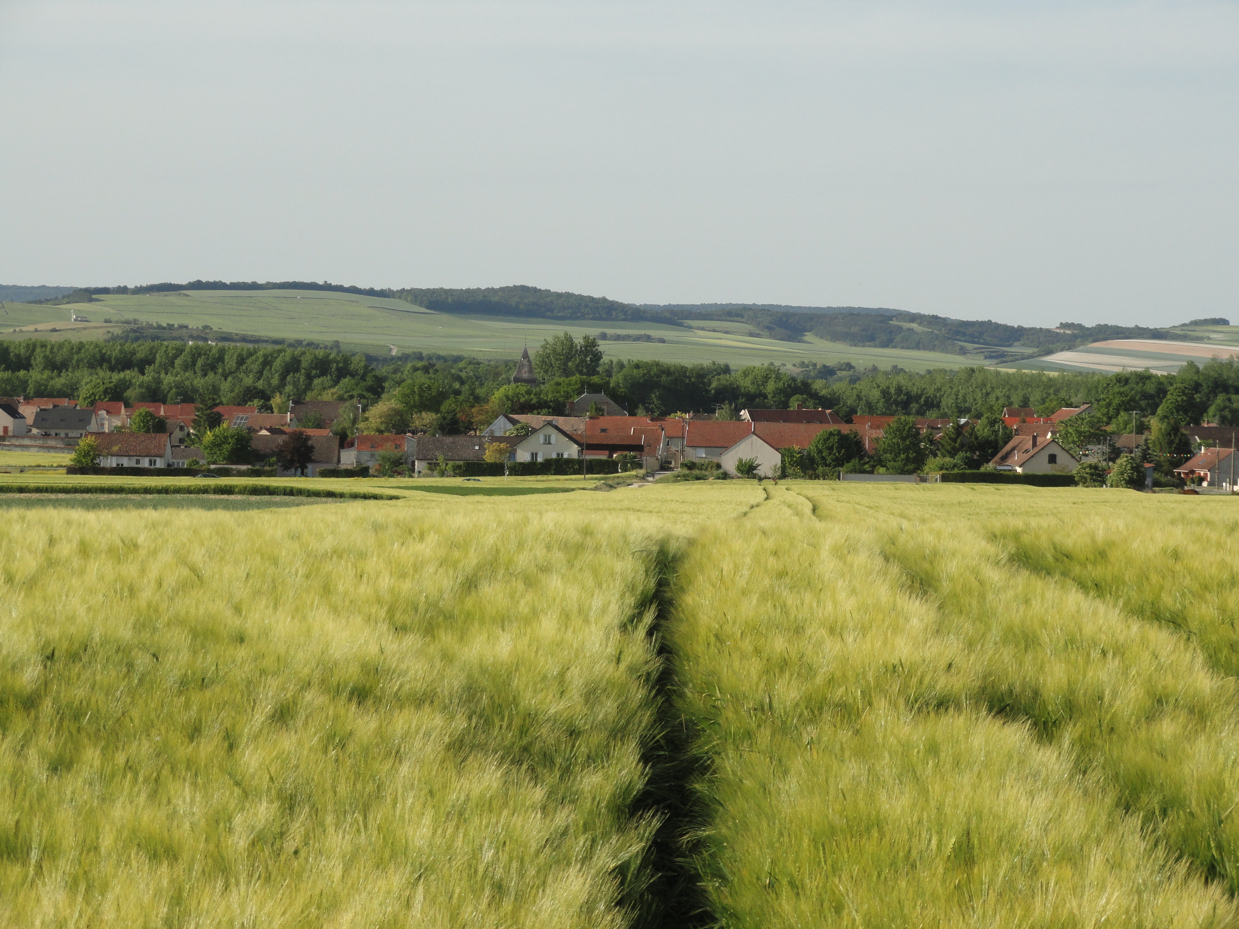 Plivot vu depuis des champs situés au Sud du village.